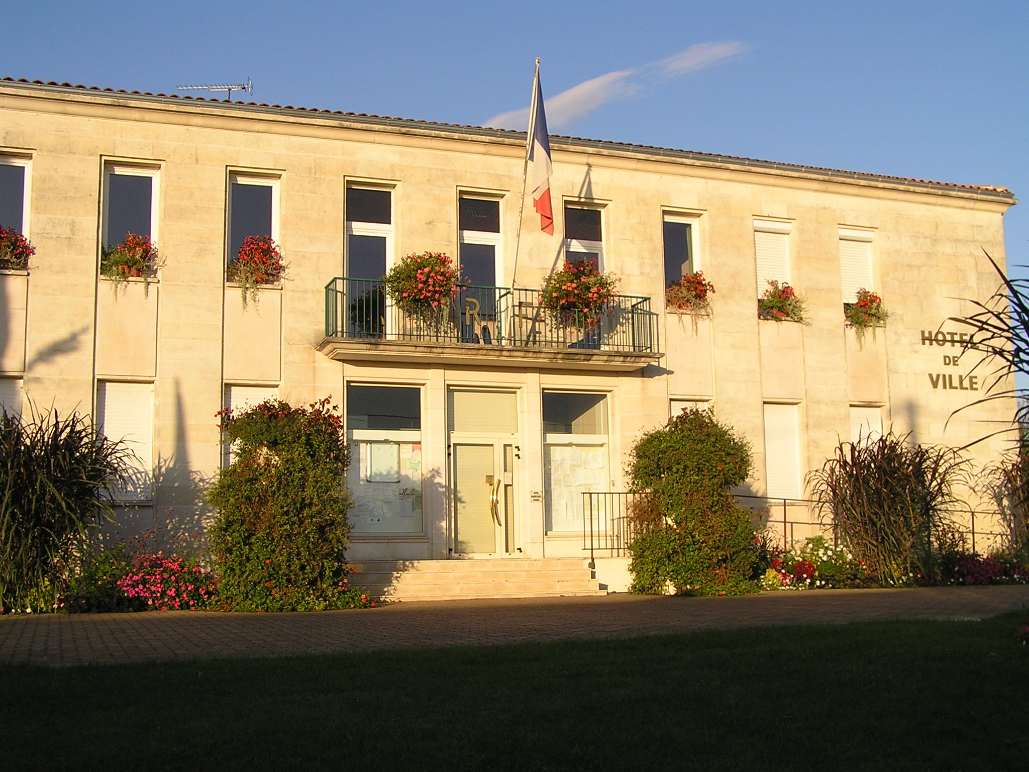 Hôtel-de-ville de Saint-Michel (Charente)